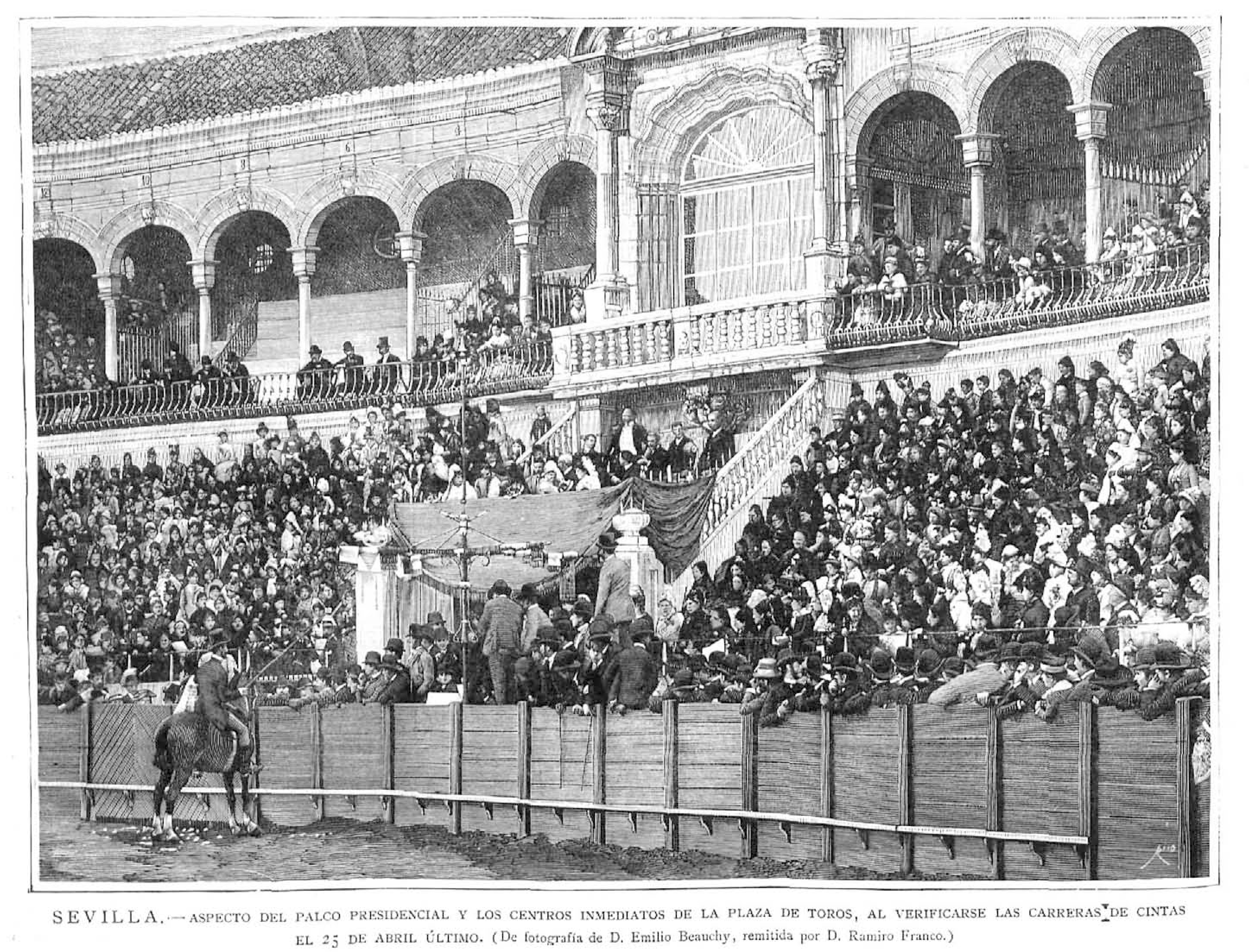 Sevilla. Aspecto del palco presidencial y los centros inmediatos de la plaza de toros, al verificarse las carreras de cintas el 2 de abril último.